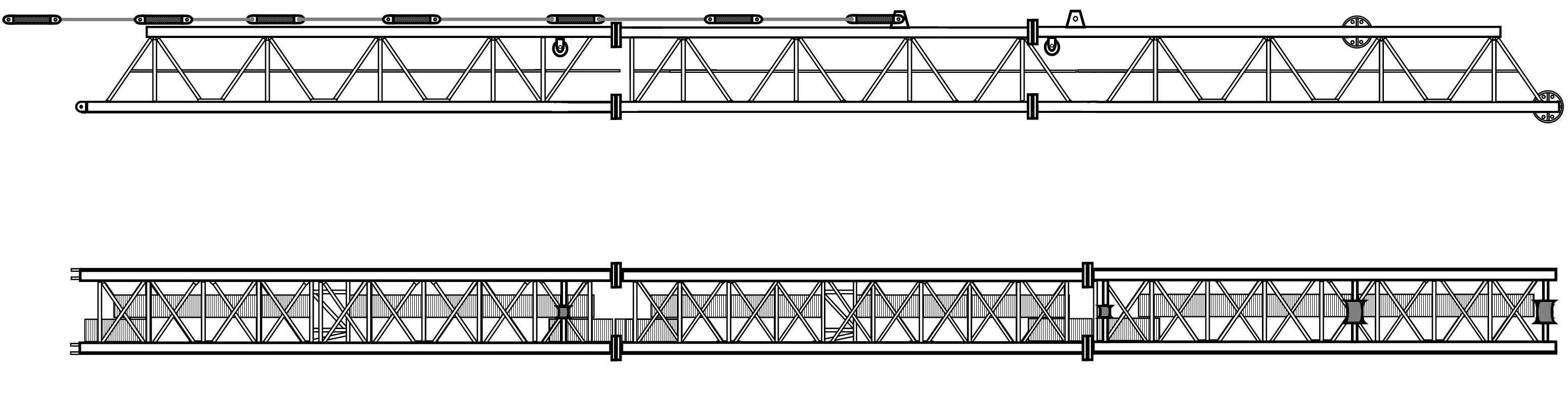 Основная стрела КБ-573